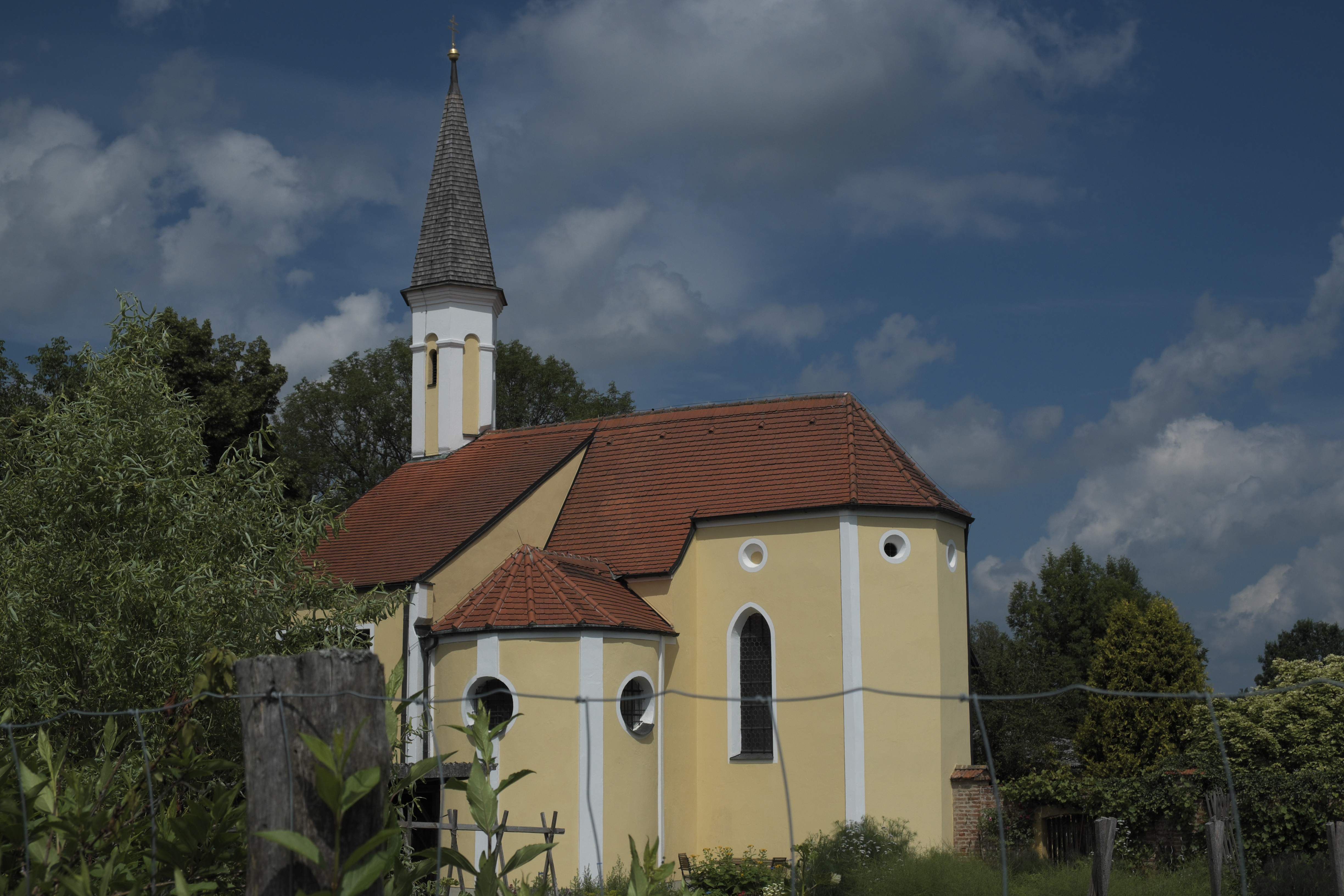 Ehemalige Burgkapelle St. Cajetan der Burg Spielberg in Oberschweinbach im Landkreis Fürstenfeldbruck (Bayern/Deutschland)